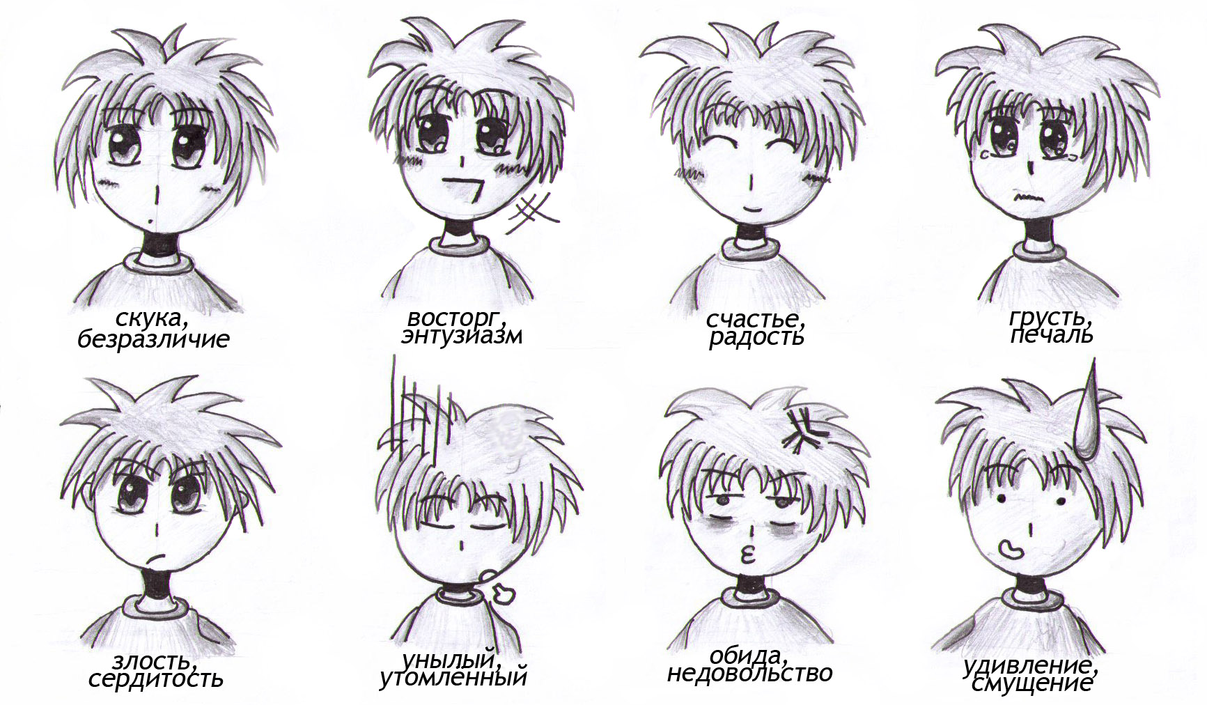 Картинка эмоций к русскоязычной статье об Аниме. Оригинал: Manga_emotions-EN.jpg